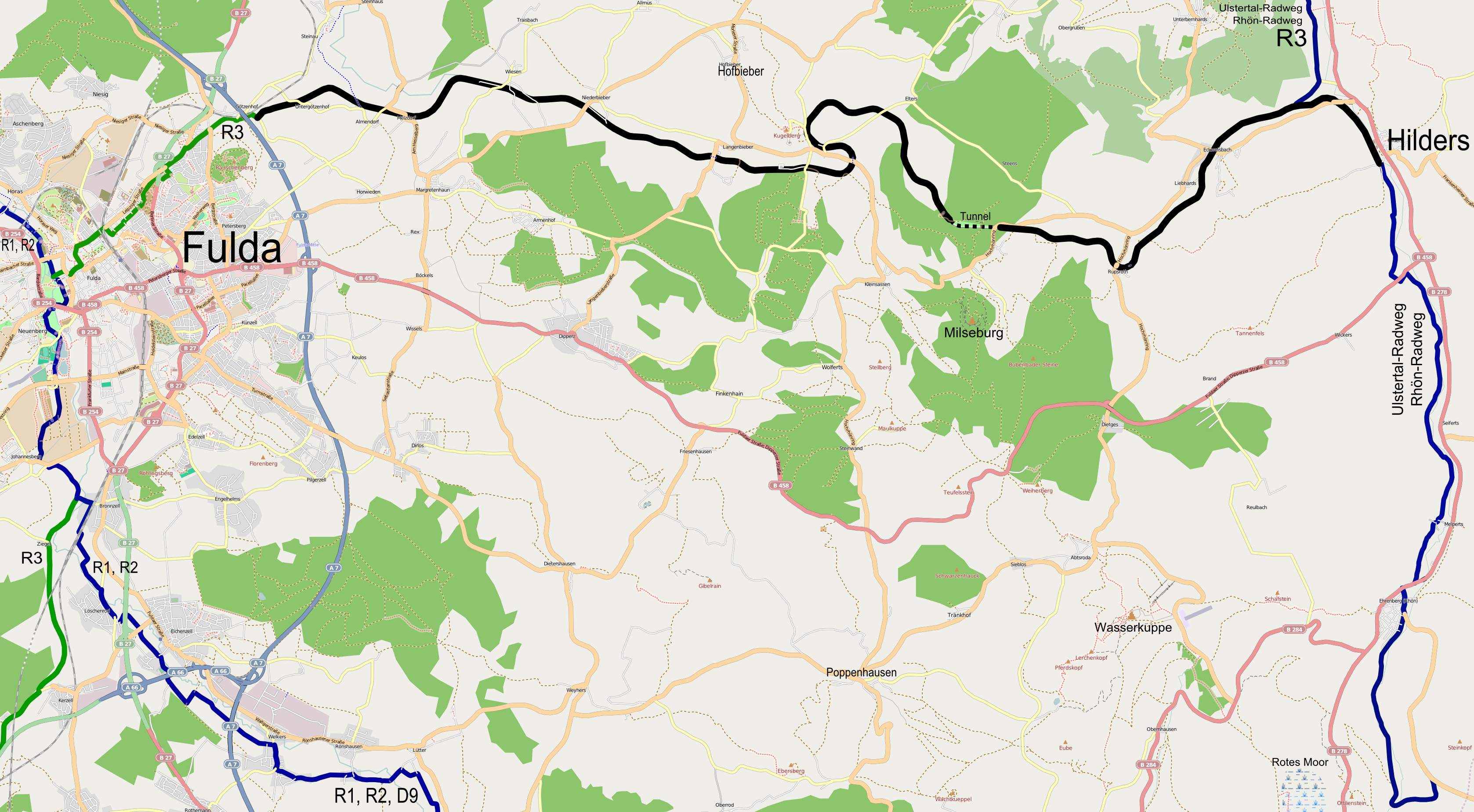 Streckendarstellung: Milseburg-Radweg und zulaufende Radwege R1, R2, R3, Ulstertal-Radwg und Rhön-Radweg auf OpenStreetMap-Karte